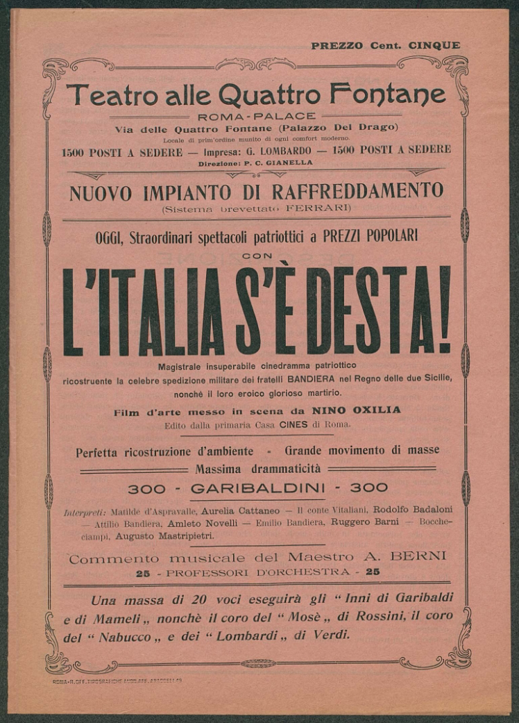 Pubblicità proiezione del film "L'Italia s'e' desta" di Nino Oxilia